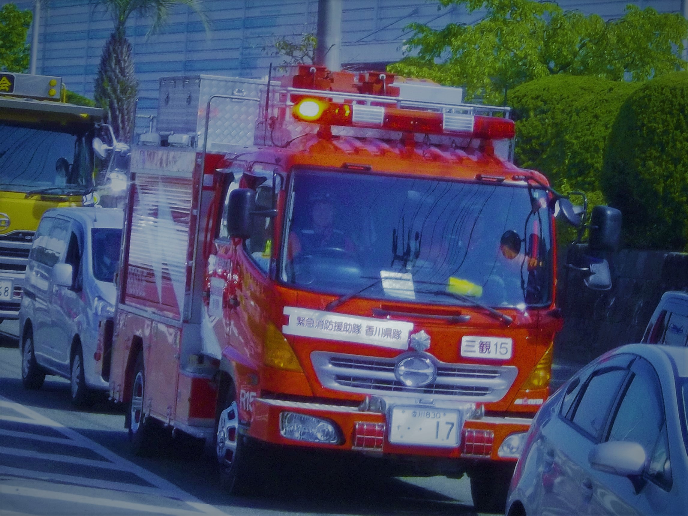 三観広域消防本部 南消防署の救助工作車（熊本地震の被災地に派遣されたさい、上熊本駅付近でバスの中から撮影）